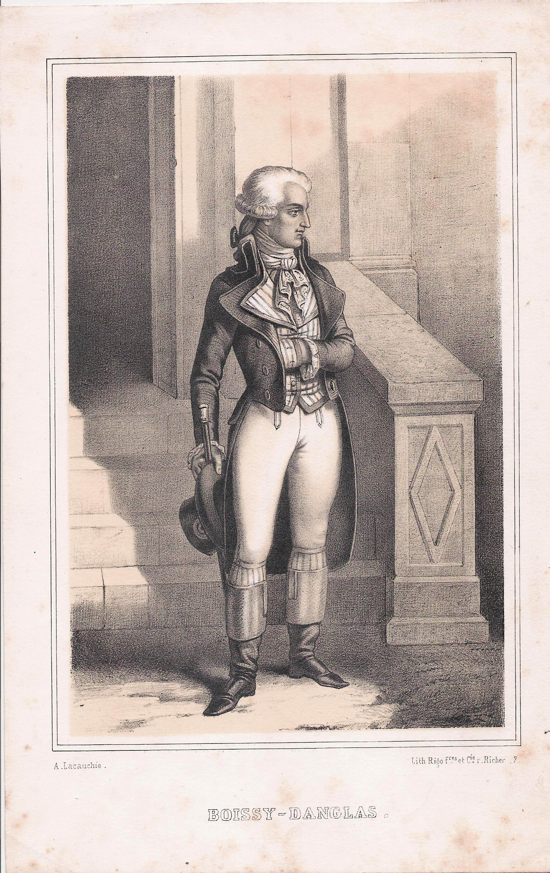 Gravure représentant Boissy d'Anglas